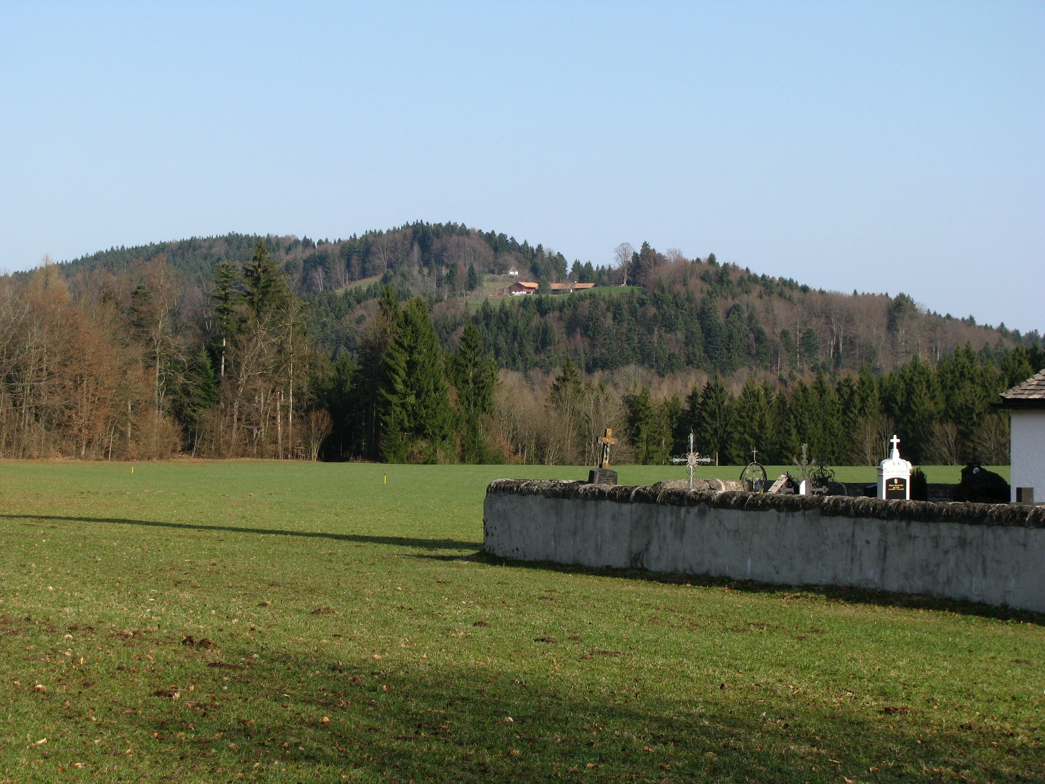 Taubenberg (Fentberg) von der Gotzinger Kirche aus gesehen